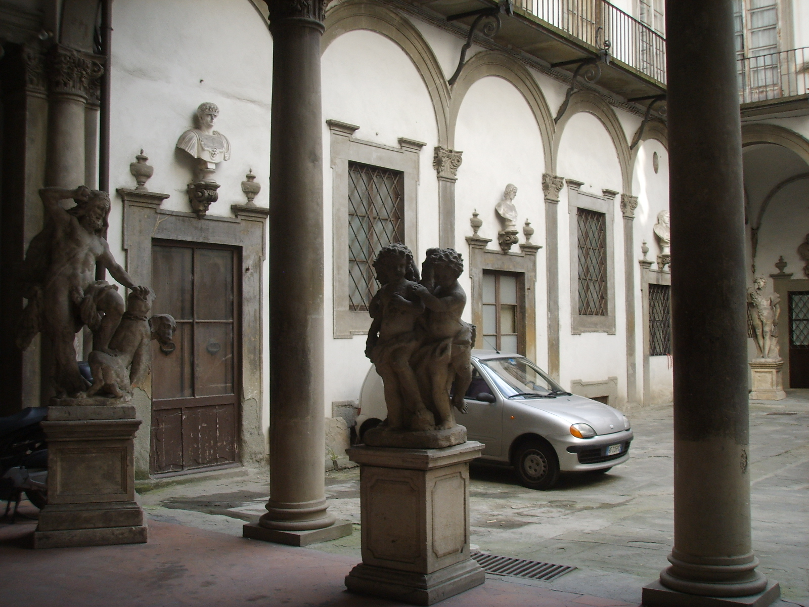 Palazzo Del Pugliese, cortile